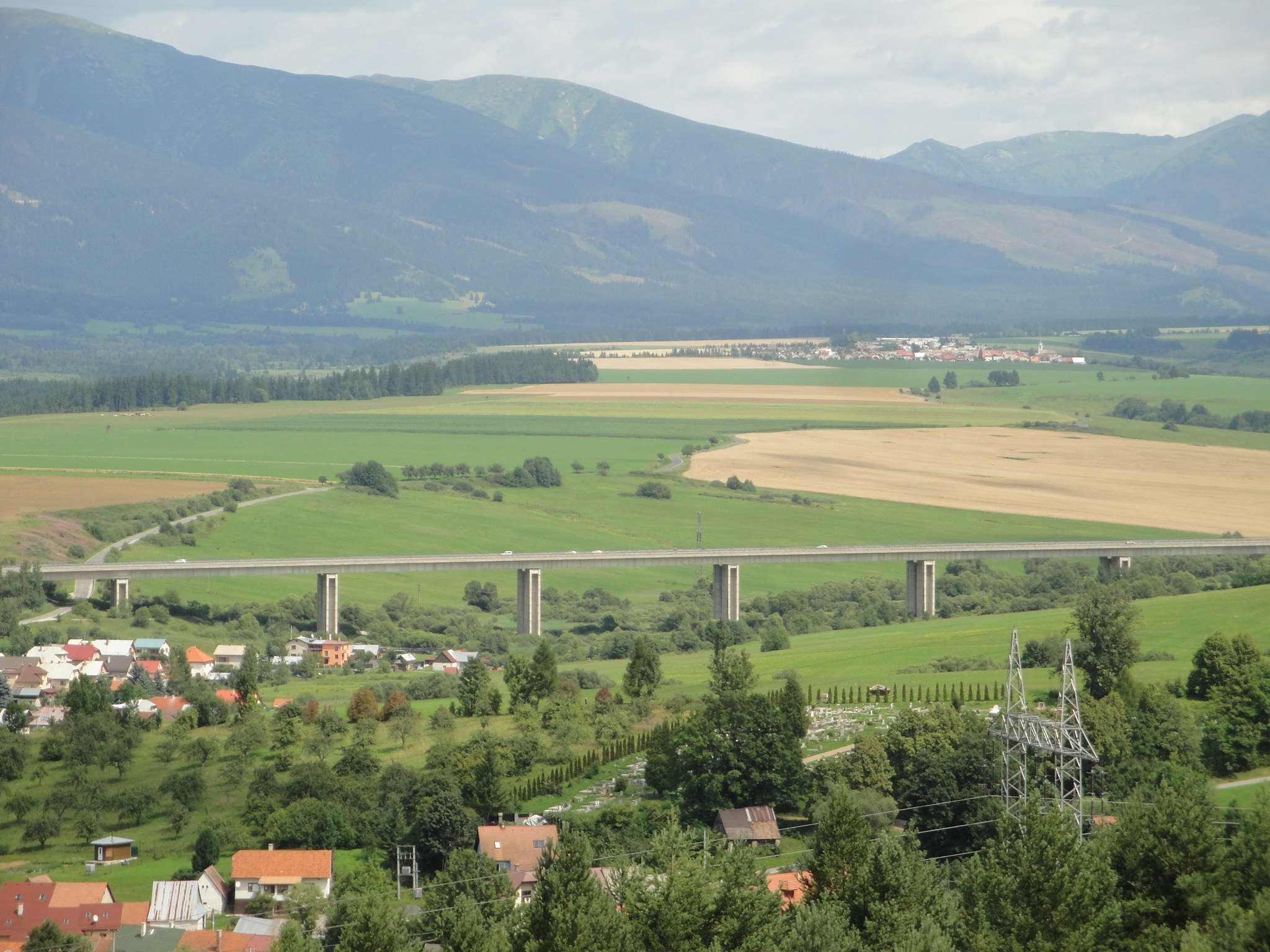 Most Dovalovec je diaľničný most na Slovensku.